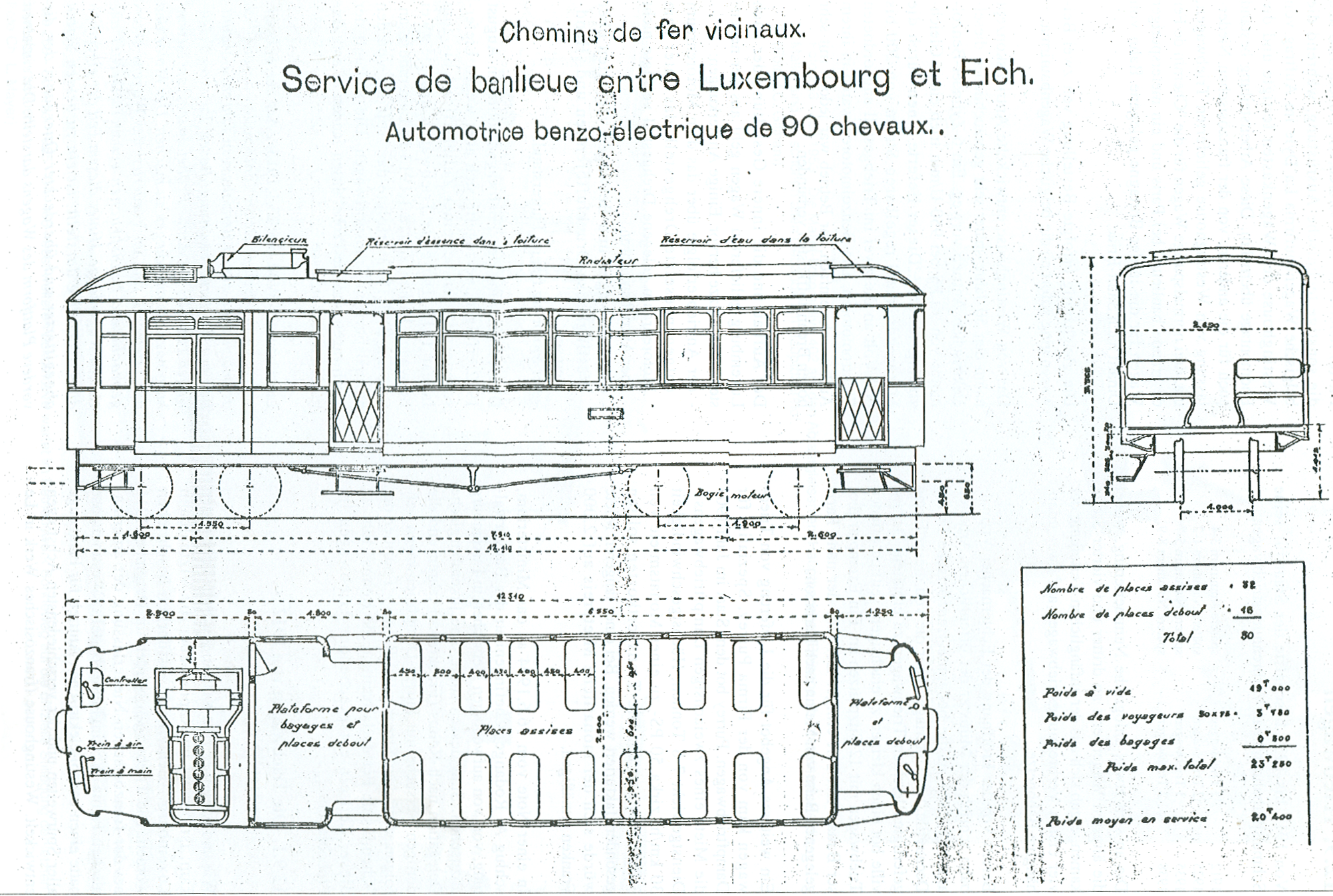 Prinzipskizze des CVE VT 3 im Originalzustand